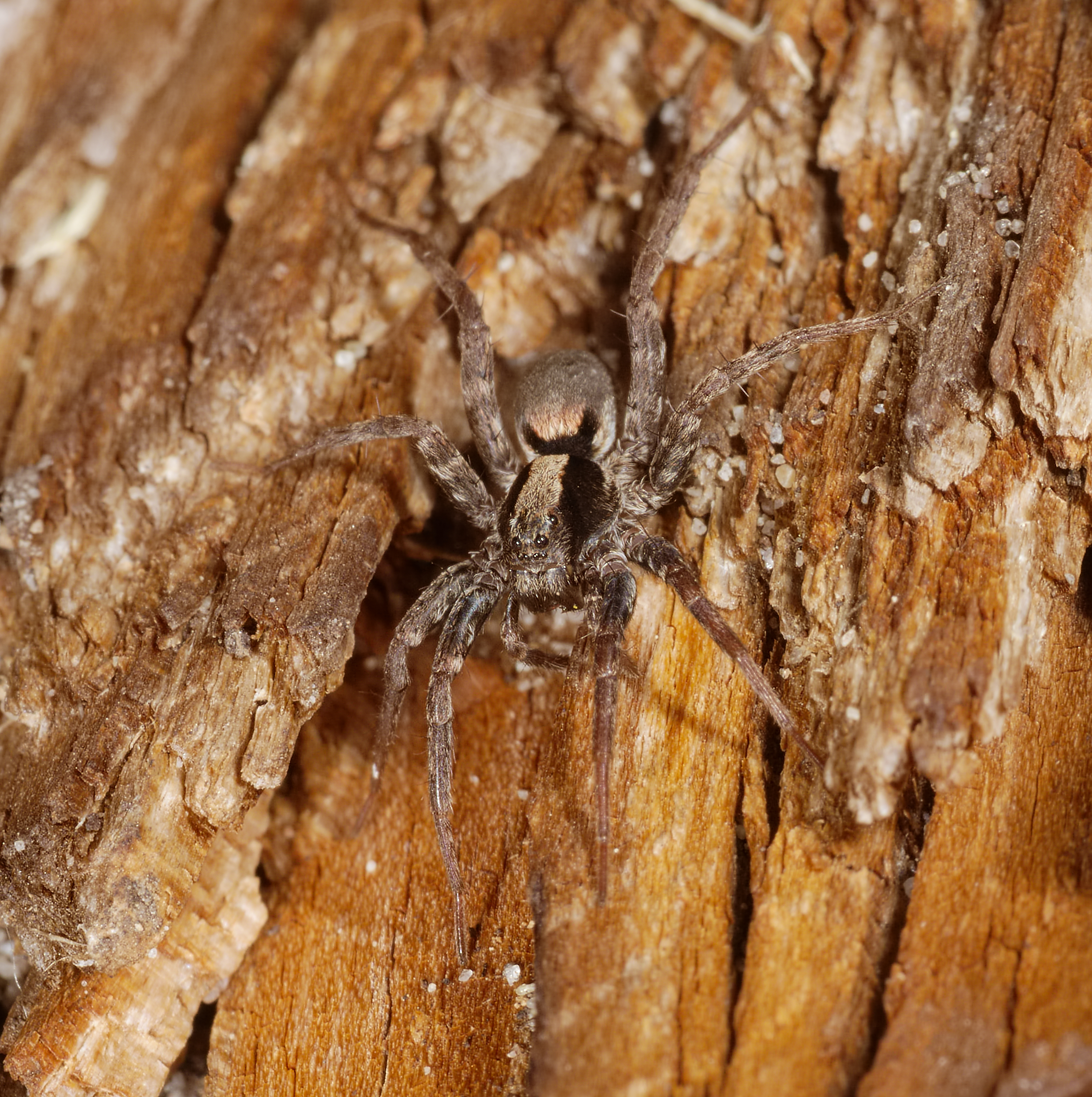 Wolfspinne - Xerolycosa nemoralis, Weibchen. Aufgenommen in Mannheim im Käfertaler Wald, Baden-Württemberg, Deutschland.